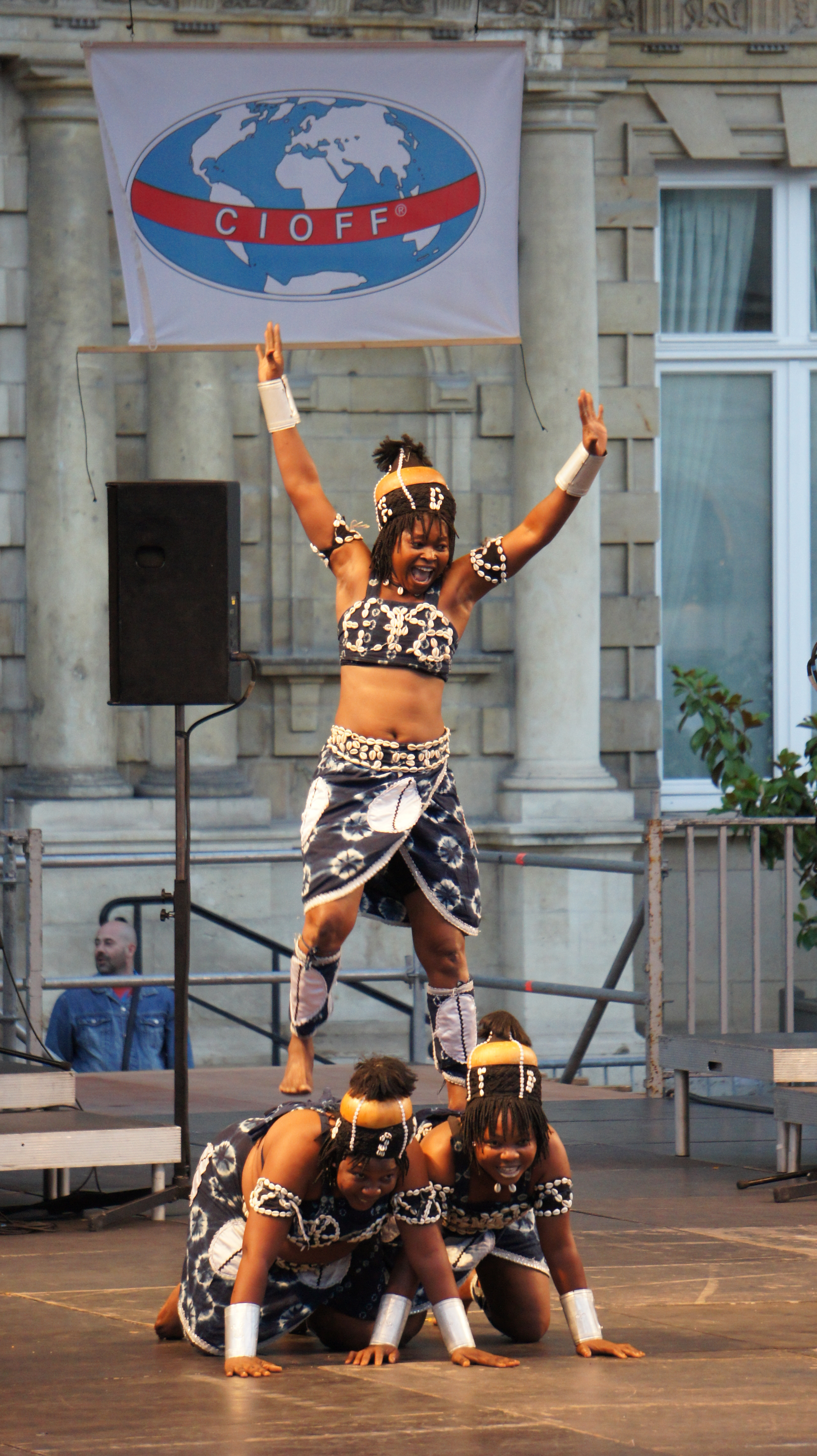 Sacre du folklore 2013 sur le parvis de la Mairie .